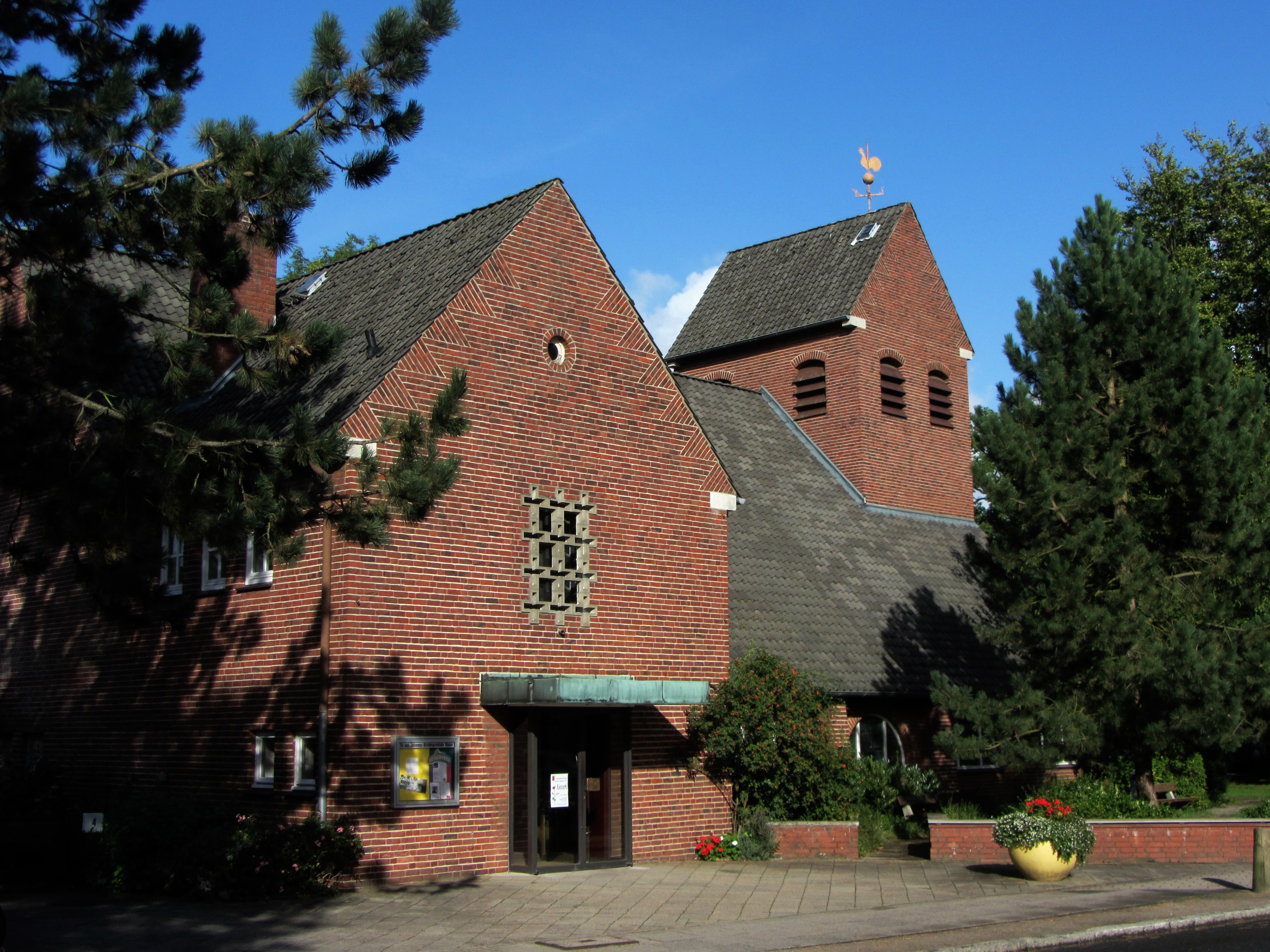 St. Johanneskirche in Hamburg Rissen. Rissener Dorfstraße 2, 22559 Hamburg, DeutschlandThis is a photograph of an architectural monument.